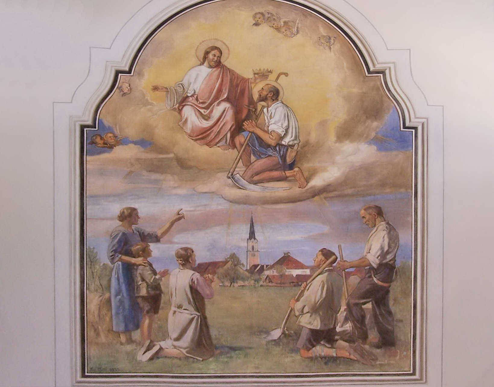 Furth in Niederbayern, Schatzhofen Nr. 14. Pfarrkirche St. Michael. Das Deckengemälde im Langhaus zeigt Jesus auf einer Wolke über Schatzhofen schwebend. Vor ihm kniet der der heilige Isisor mit Sense und Wetzstein der von Jesus im Himmel empfangen und mit einer goldenen Krone ausgestattet wird. Unten betende Bauersleute, die bei ihrer Arbeit innenhalten. Im Hintergrund sind Kirche und Pfarrhaus von Schatzhofen dargestellt. Das Gemälde wurde im Jahr 1935 von Fritz Muth geschaffen